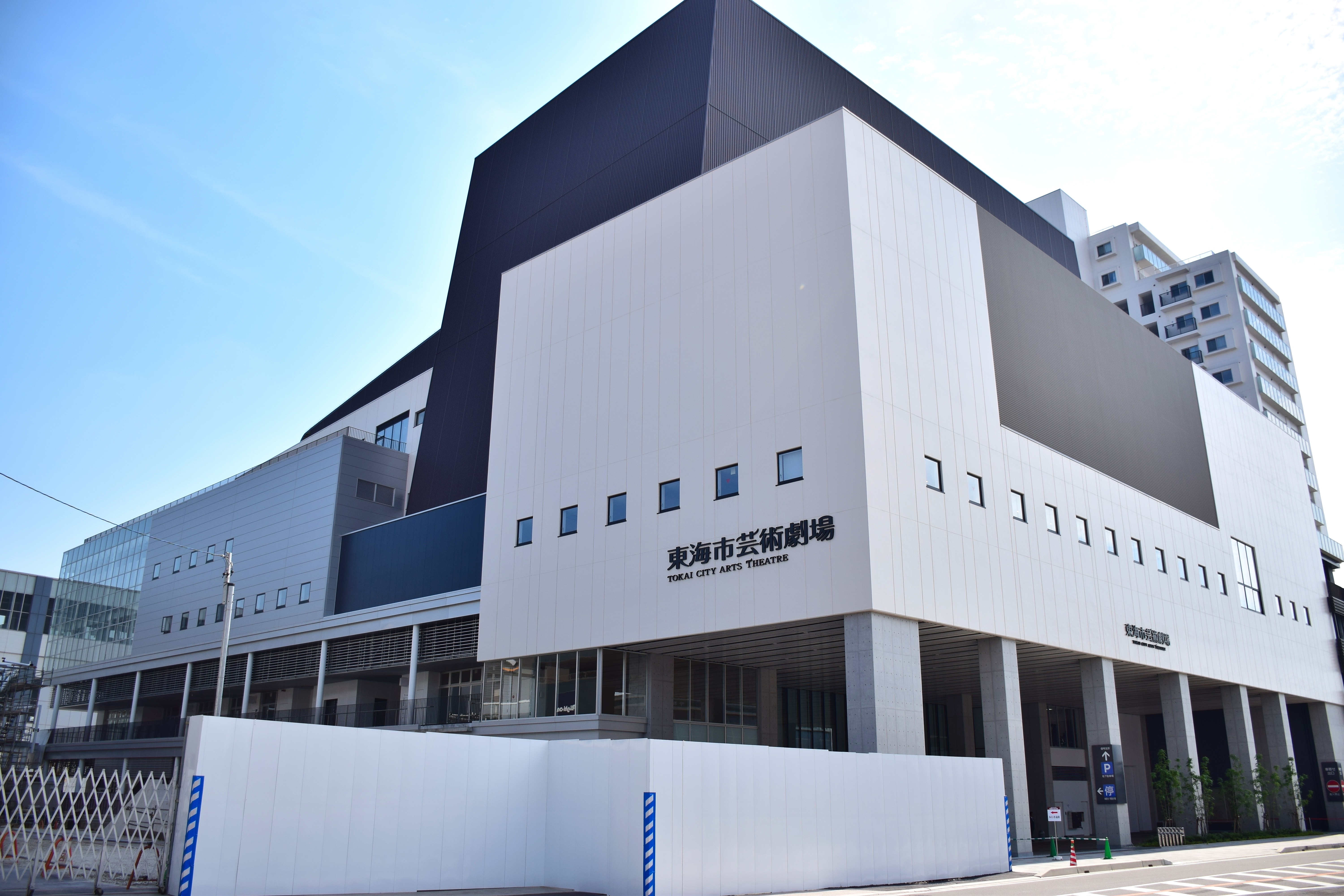 ユウナル東海。東海市芸術劇場。